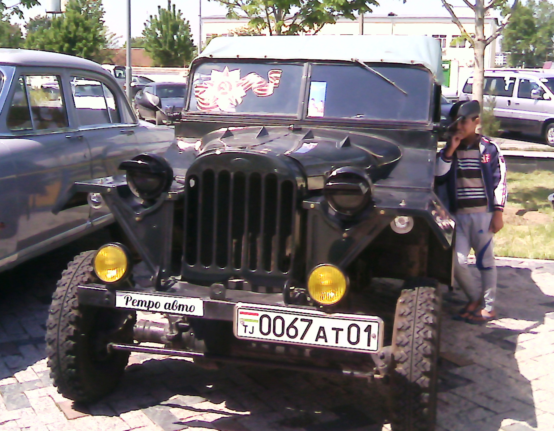 Тоҷикӣ: Намоиши мошинҳои бароришаш таърихӣ дар намоишгоҳи "Ретро - 2016", Душанбе